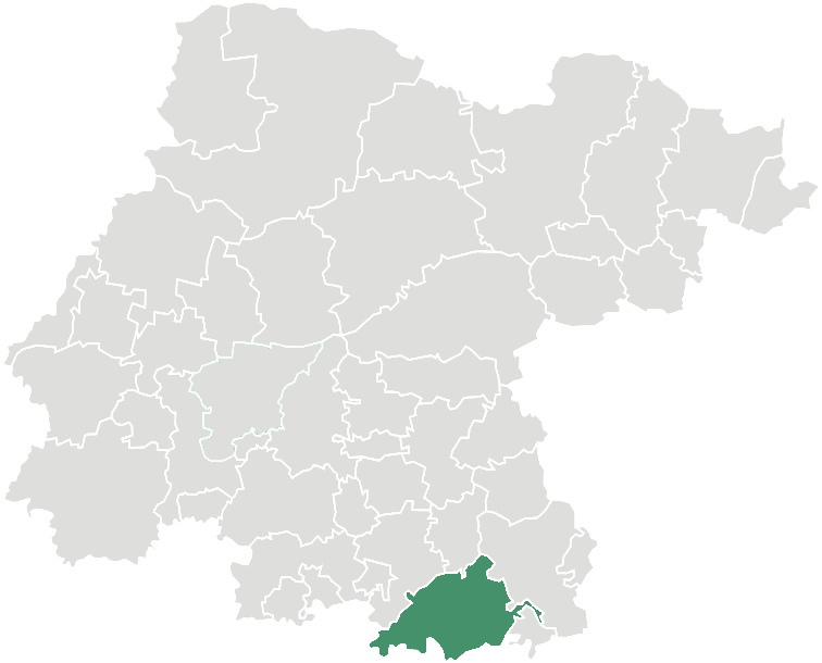 El municipio de Acámbaro en el Estado de Guanajuato, México.